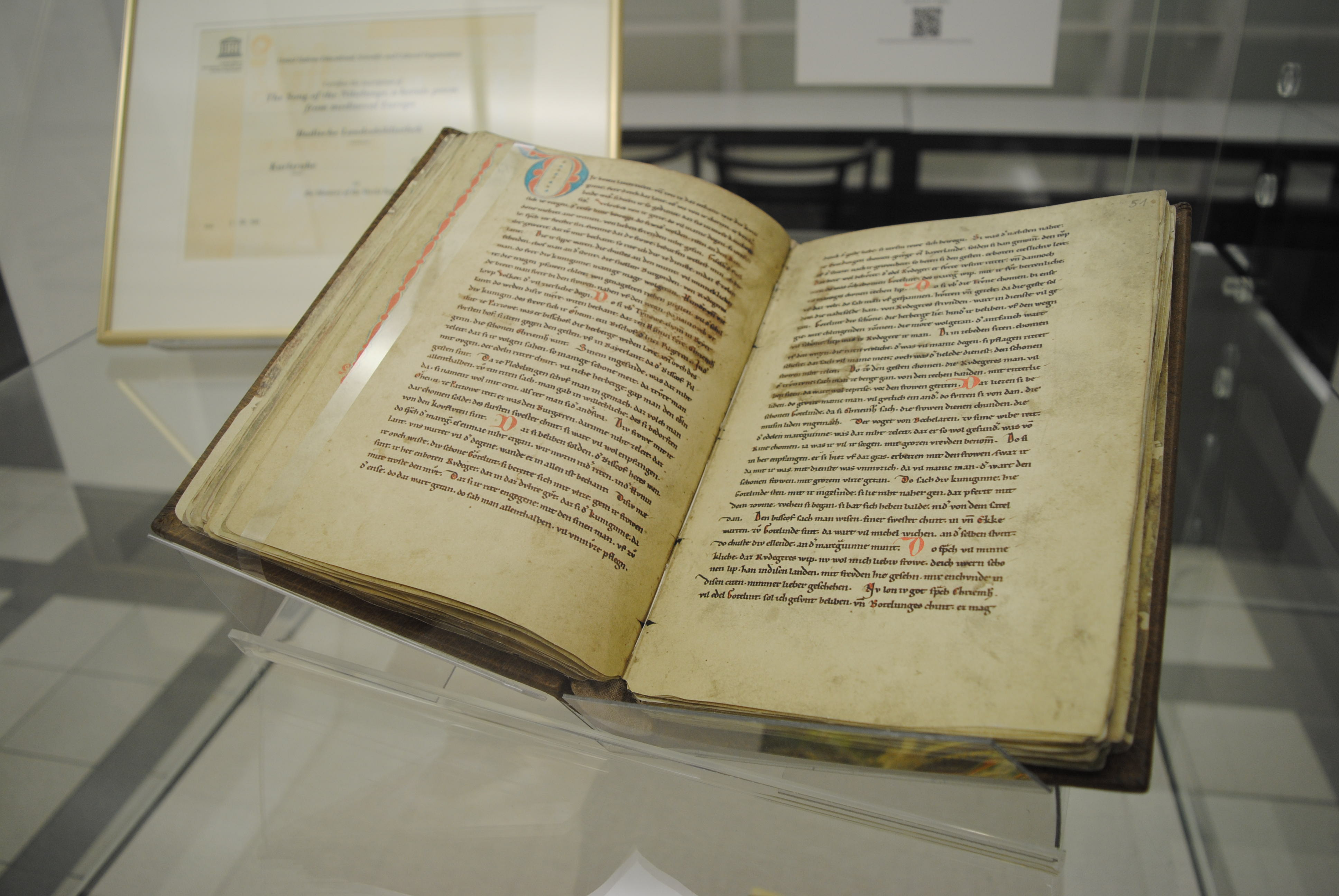 Nibelungenlied, Handschrift auf Pergament („Nibelungenhandschrift C“), zweites Viertel des 13. Jahrhunderts. Badischen Landesbibliothek Karlsruhe, Inv.-Nr. Cod. Donaueschingen 63.